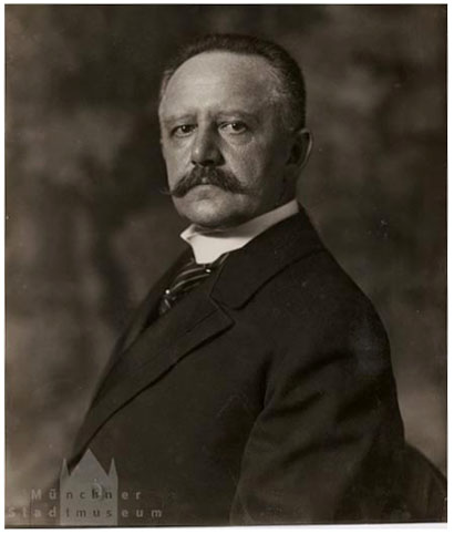 Otto von Dandl, Bayerischer Ministerpräsident (1868-1942)